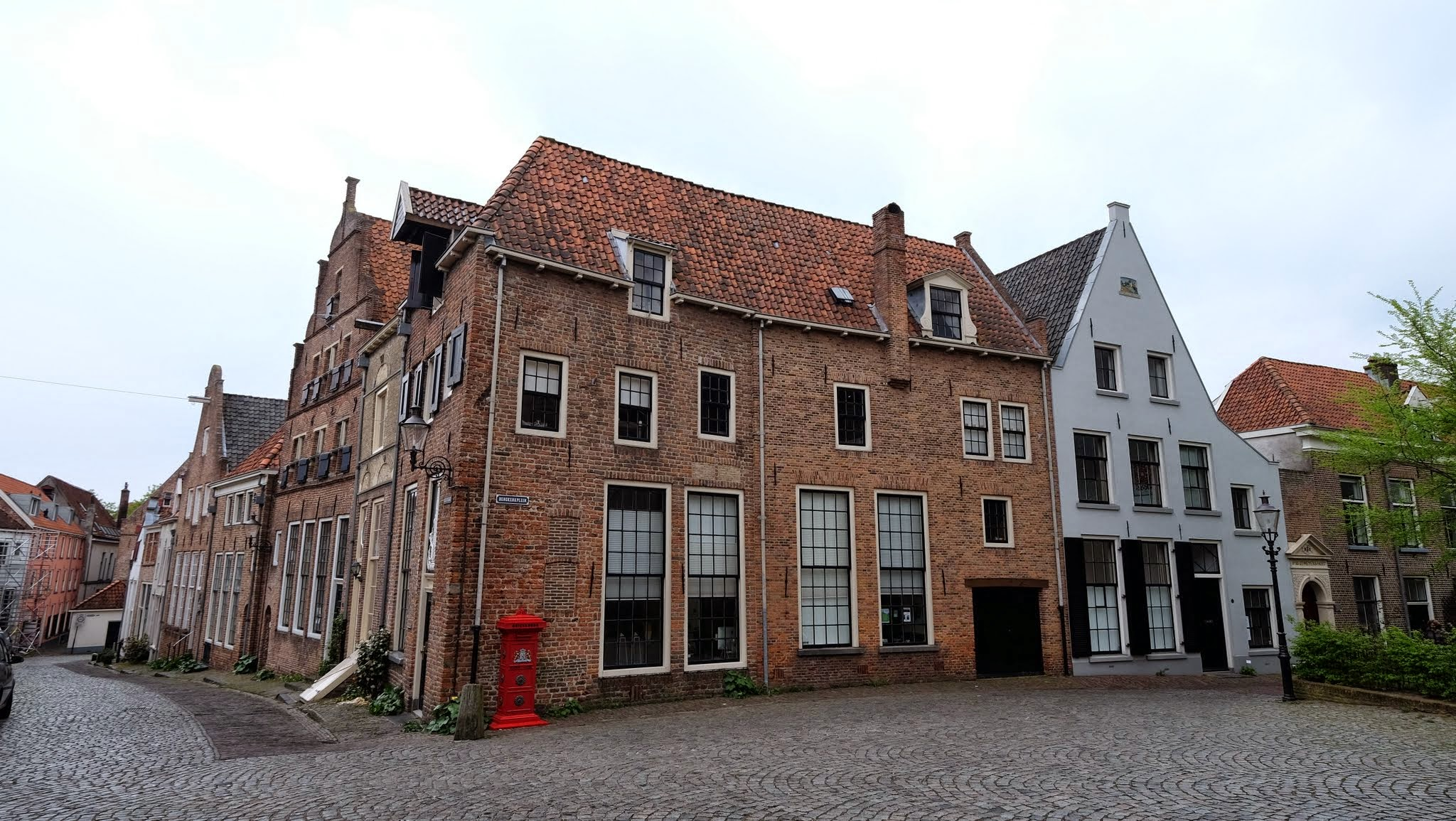 Deventer, Netherlands